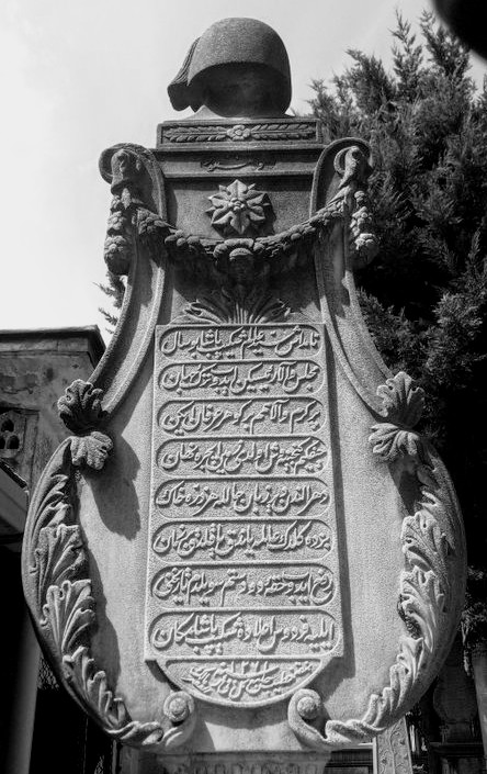 Mehmed Şekib Paşa'nın kabri.